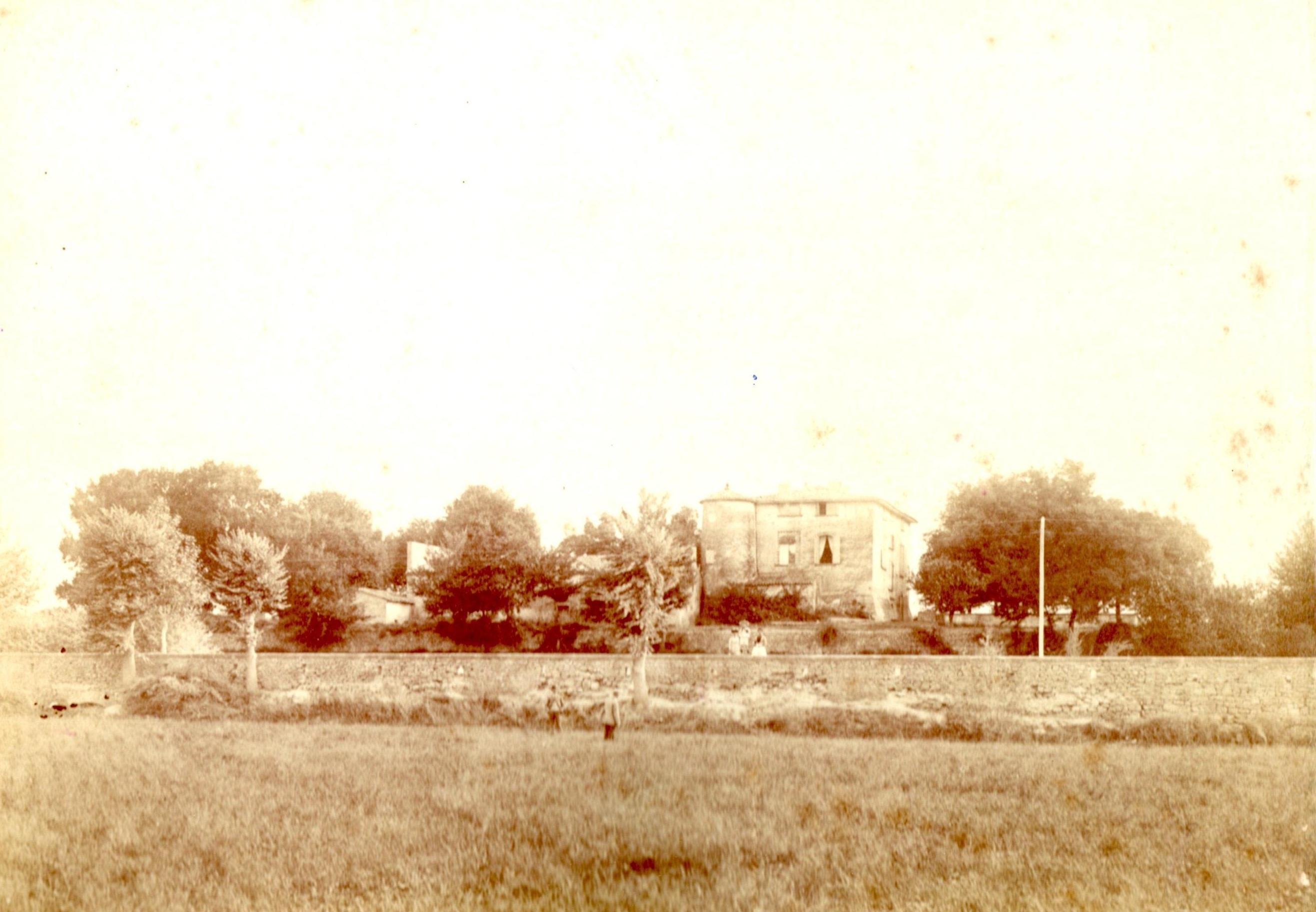 Vue du château de la CALADE depuis les champs en 1892